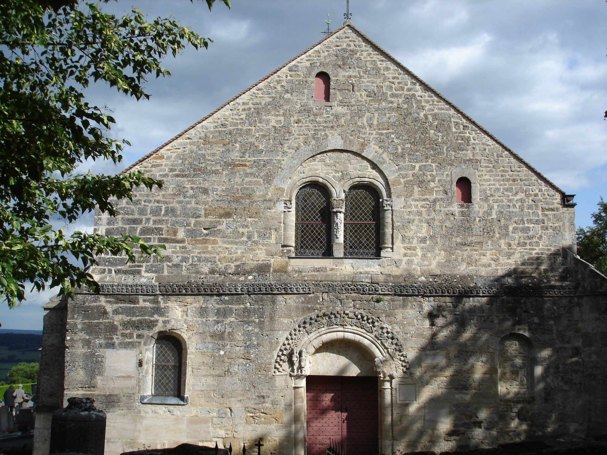 Façade romane de l'église de Clefmont (Haute-Marne)